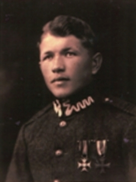 Wojciech Dąbrowski (1900-1998)